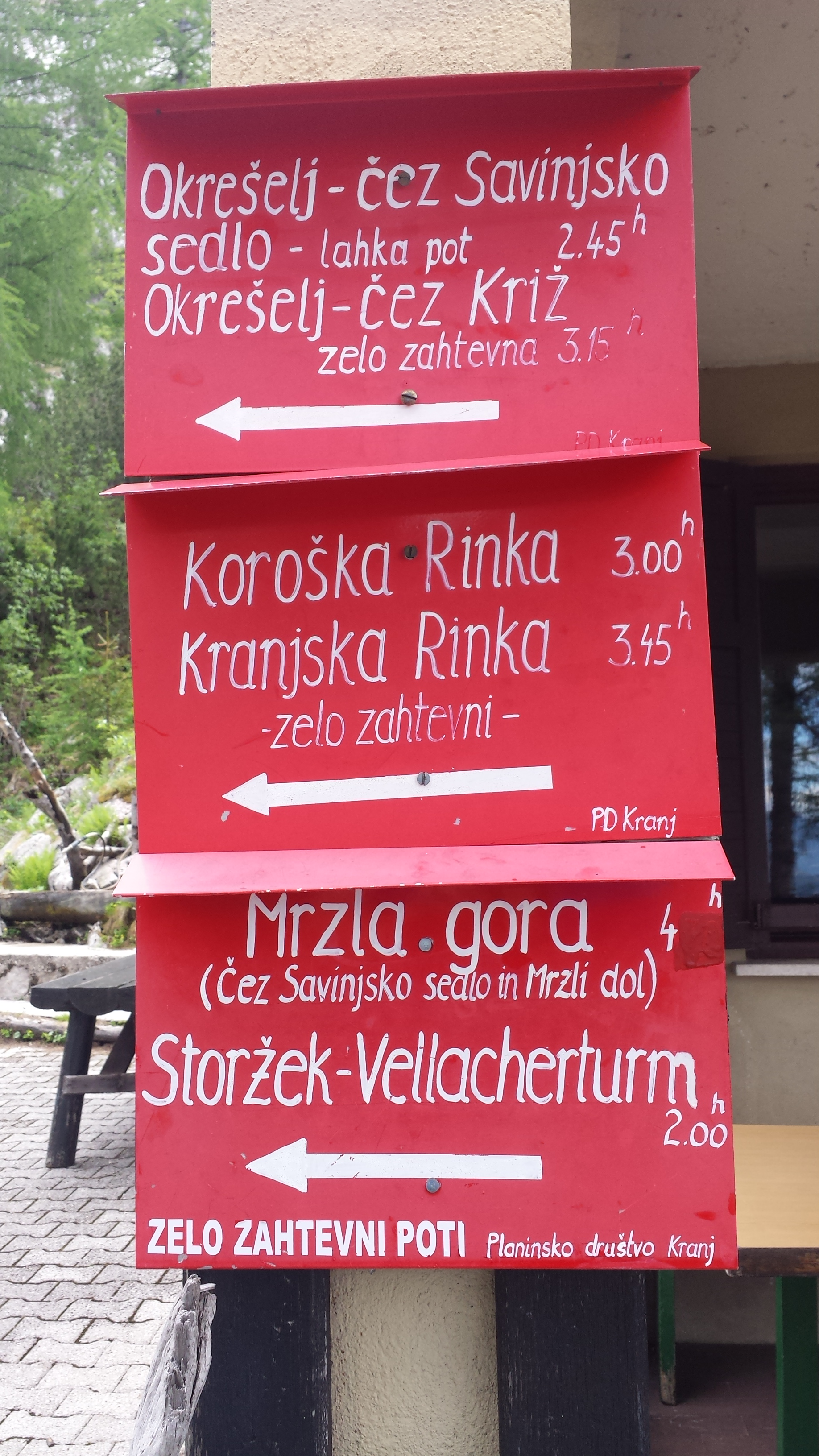 Kranjska koča na Ledinah 1869 m. n. m. Jezersko, Slovenija Smerokazi pri koči